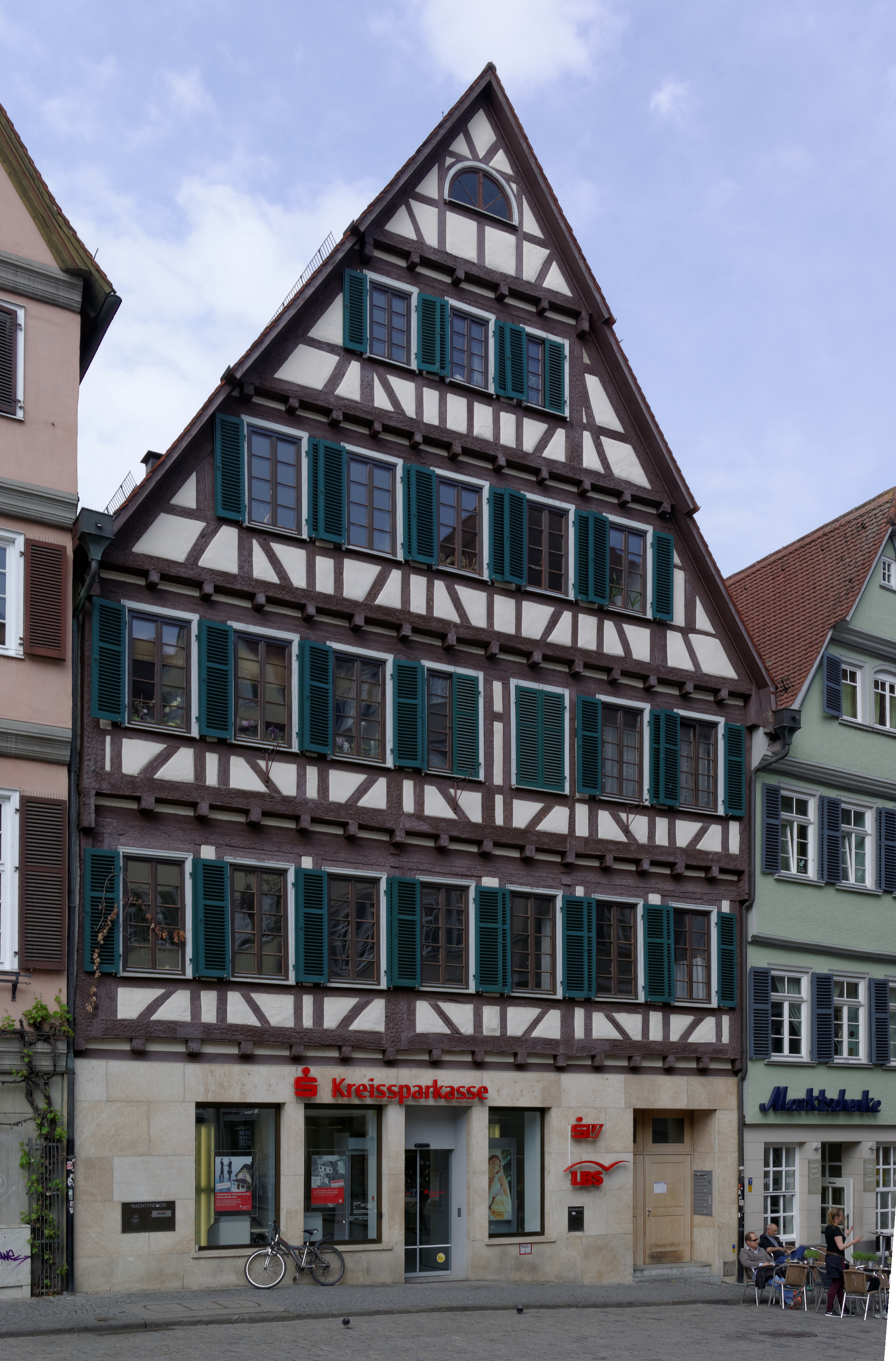 Tübingen, Am Markt 9